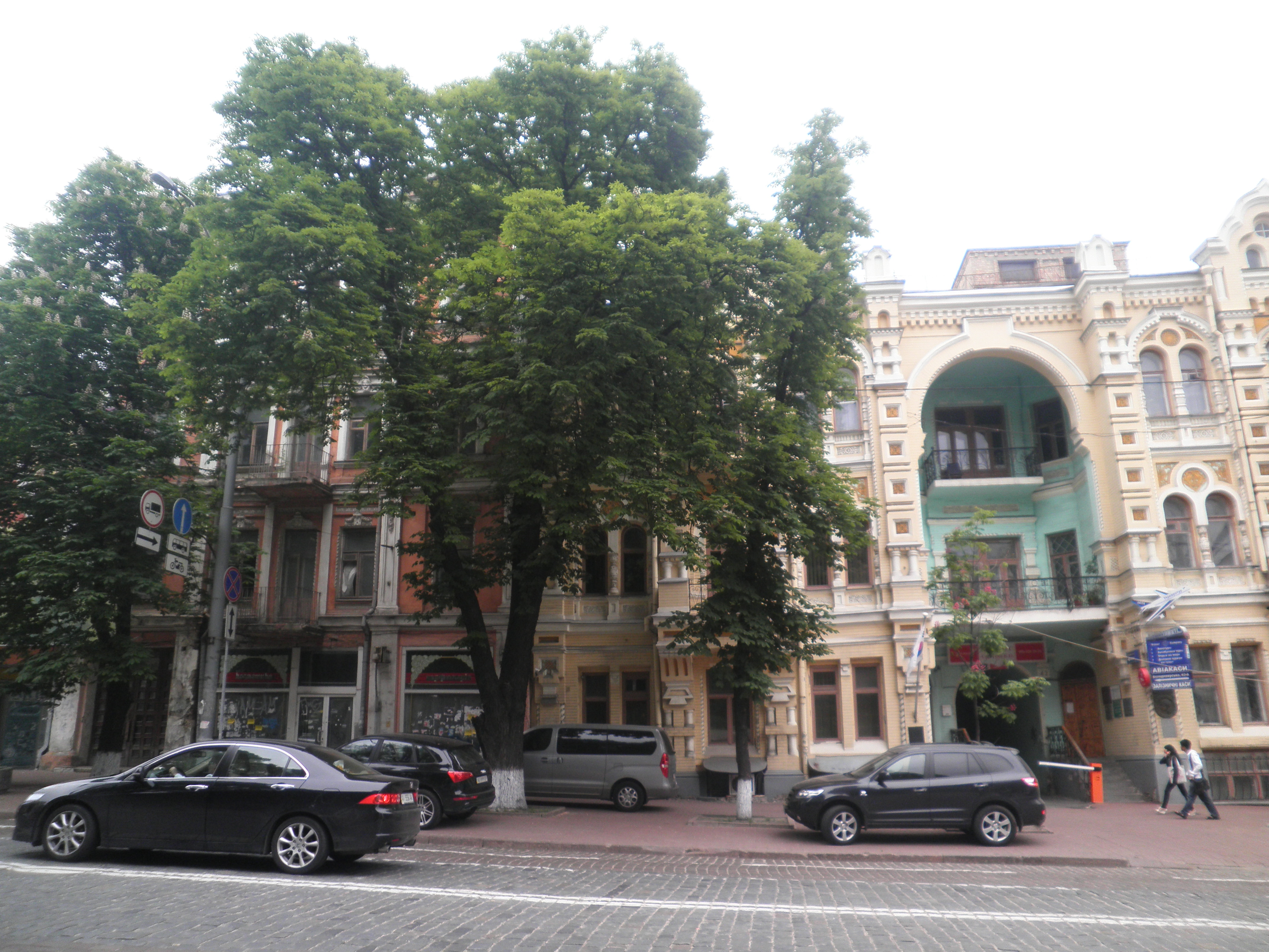 Посольство Південної Кореї в Києві